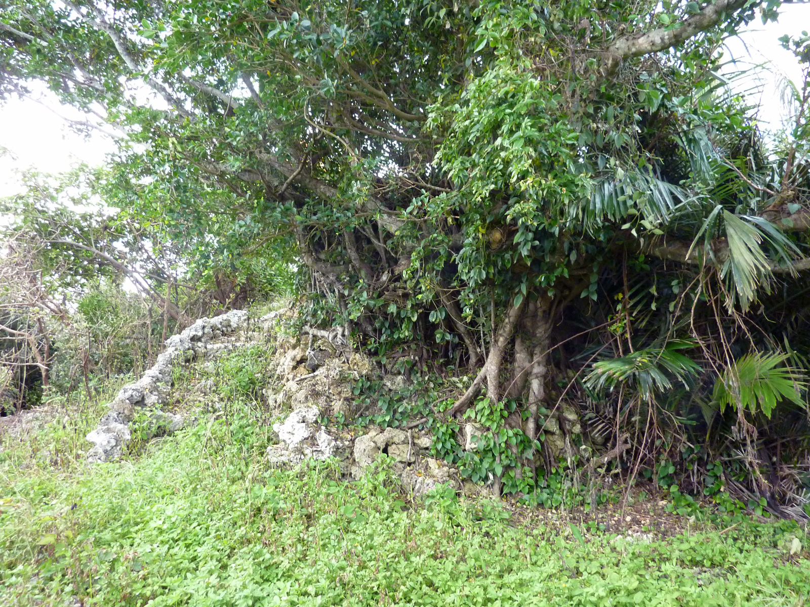 来間遠見（宮古島市） - 先島諸島火番盛のひとつ